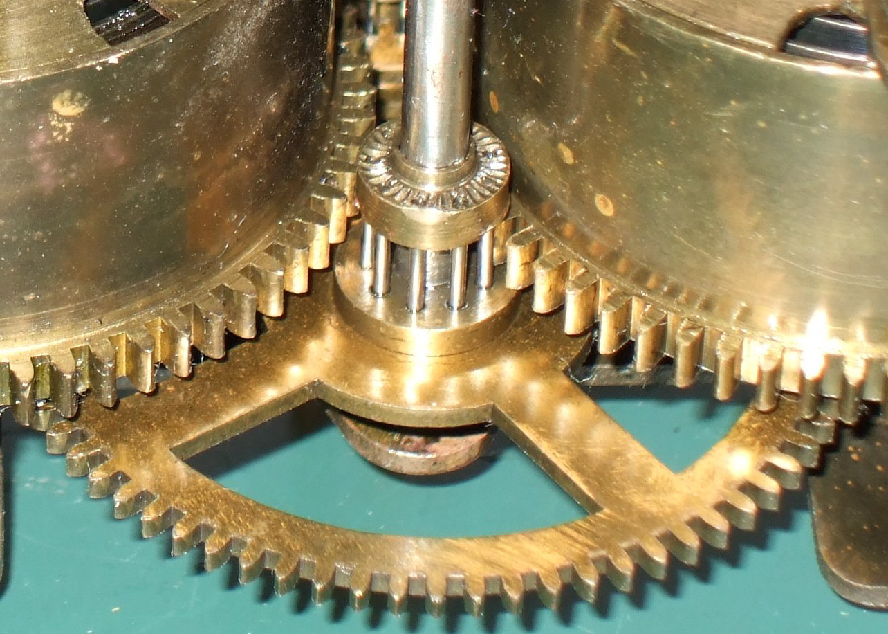 Gros-plan sur un engrenage à fuseaux ou à lantern.